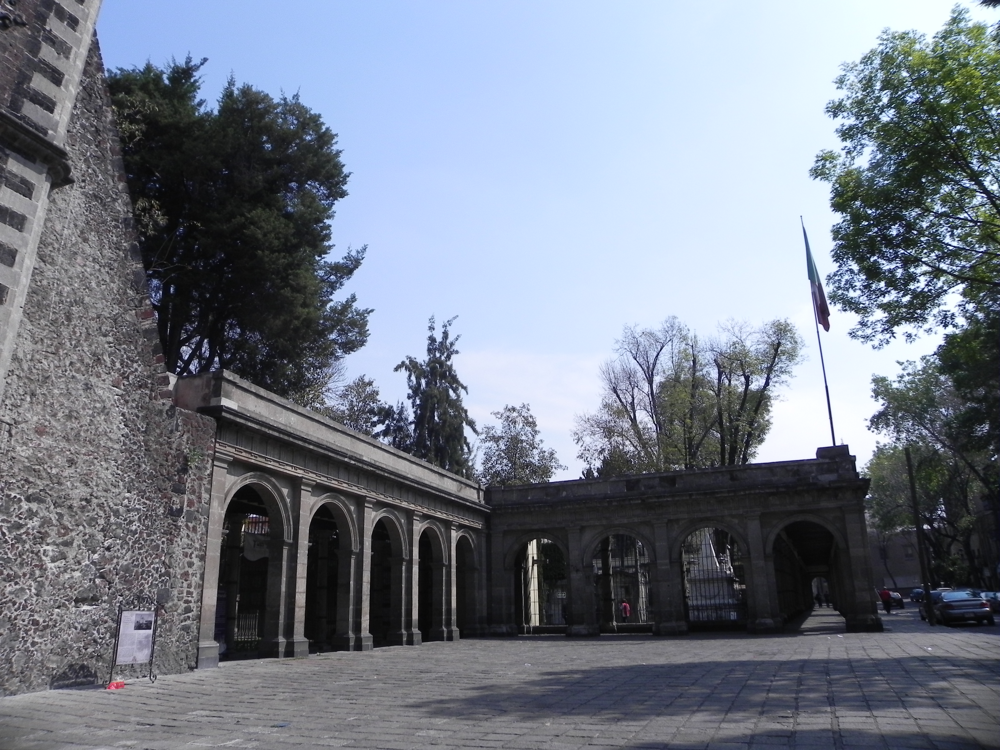 Panteón de los Hombres Ilustres